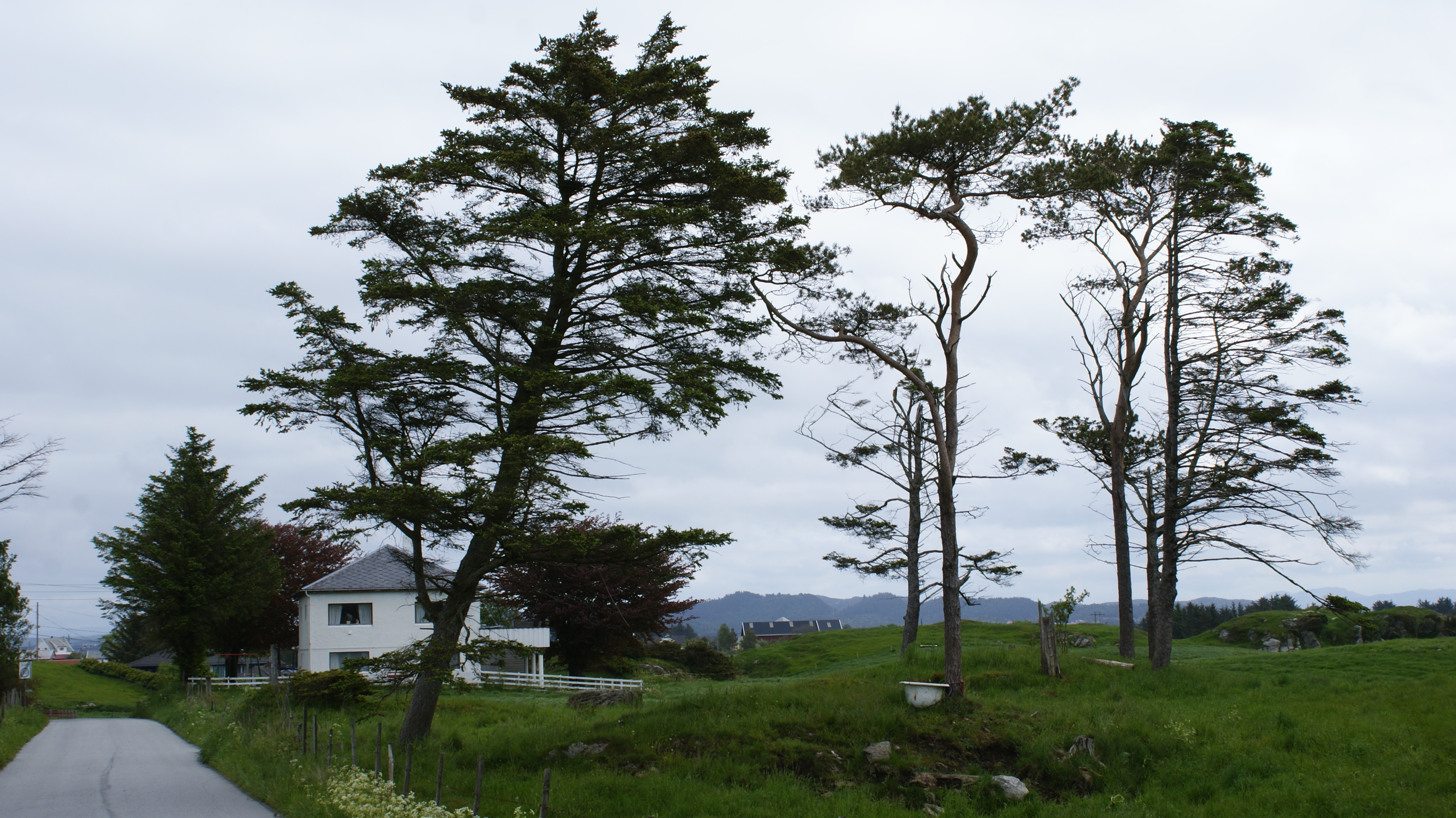 Farm on Karmøya, Haugesundet, Rogaland, Norway.